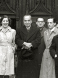 Título original: El gobernador civil de Gipuzkoa, barón de Benasque, junto a un grupo de periodistas (2/4) Localización: Guipúzcoa